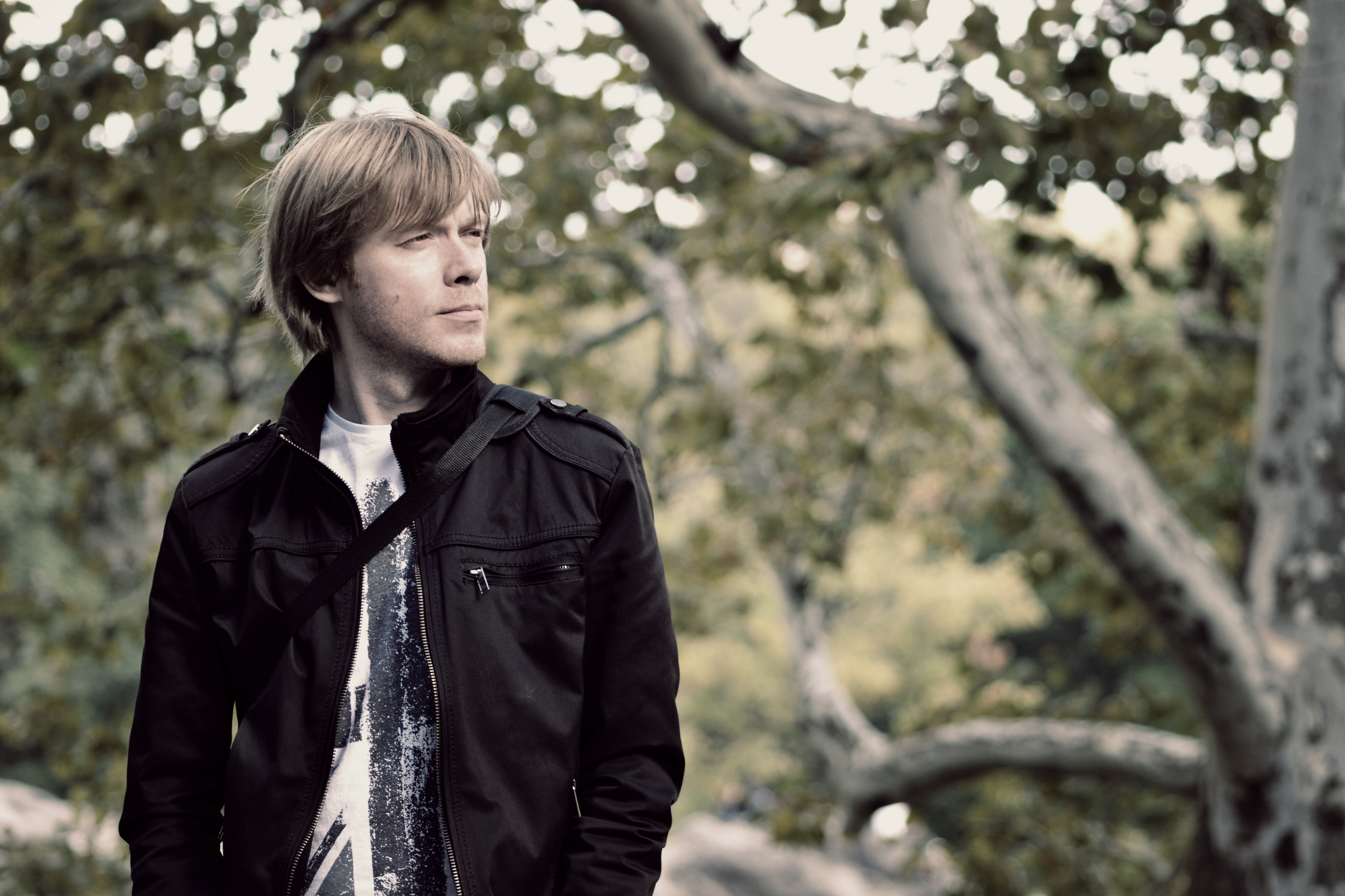 Jānis Strazds 2014. gadā